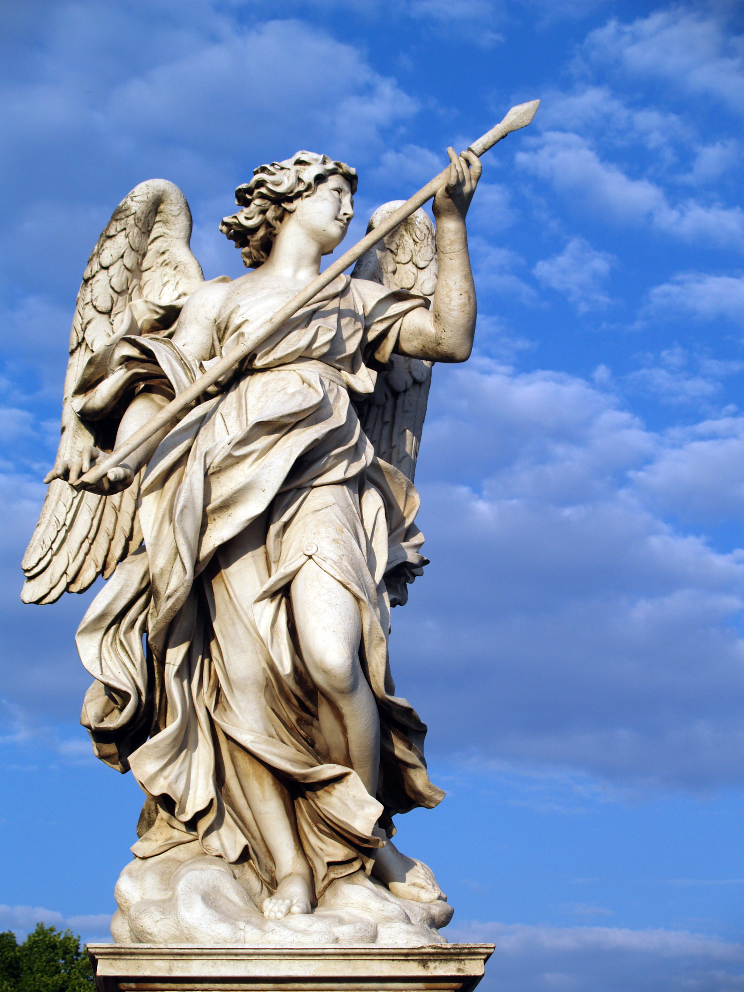 Roma. Ponte Sant'Angelo.